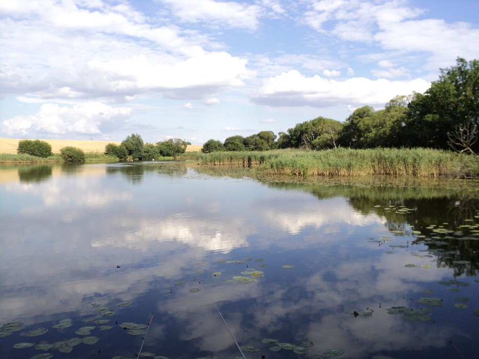 Kleiner See bei Blankenhof, Mecklenburg-Vorpommern. Der Zustand des Kleinen Sees hat sich die letzten Jahre stark verbessert.